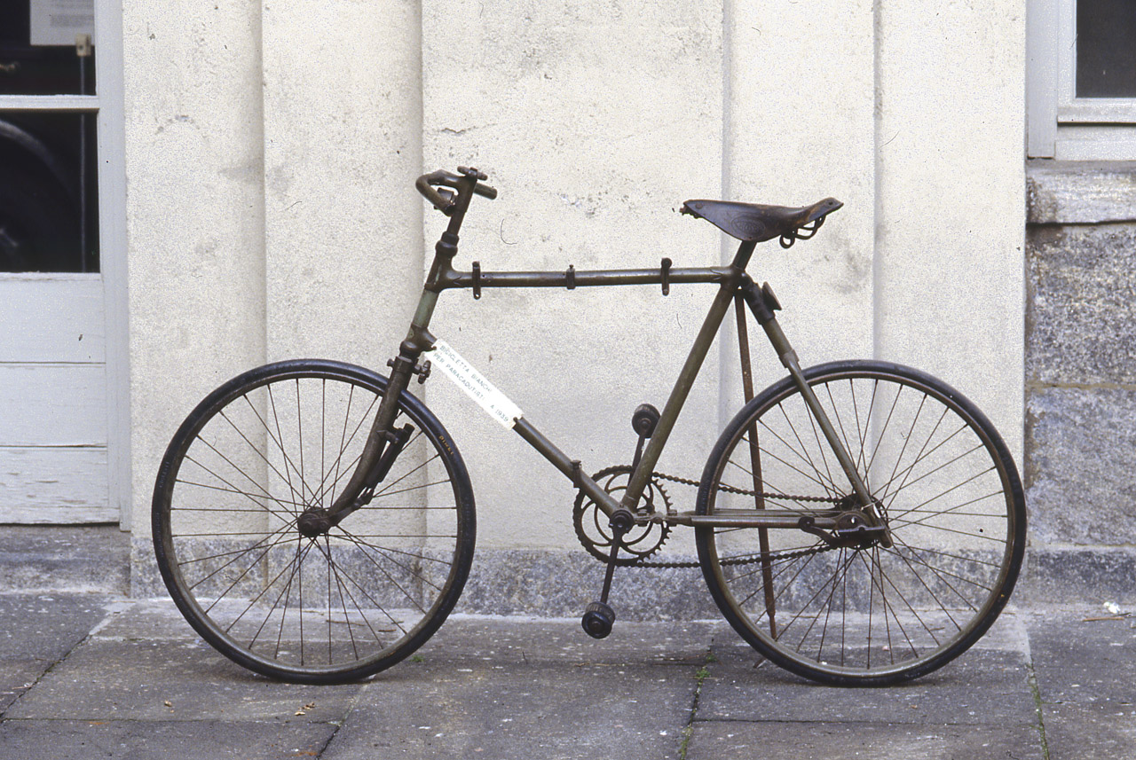 Bicicletta militare pieghevole con telaio tubolare a trapezio in acciaio, con verniciatura grigioverde; le cerniere per piegare il telaio sono situate sul tubo orizzontale e sul tubo obliquo. La bicicletta inoltre è provvista di molleggi sul telaio e sulla forcella: la forcella è molleggiata per mezzo di leve oscillanti e molle cilindriche, mentre il telaio presenta una sospensione telescopica con molla cilindrica in corrispondenza del nodo di sella. La bicicletta monta una sella in pelle con due molle posteriori. Il manubrio dritto è sprovvisto di manopole. Il veicolo dispone di un freno sulla ruota posteriore comandato a contropedale. Il funzionamento si basa su una trasmissione a catena sulla ruota posteriore, con un pignone a scatto fisso. La bicicletta appoggia su due ruote con cerchi e raggi tangenti metallici e gomme piene; la ruota anteriore conta 32 raggi, mentre la ruota posteriore presenta 36 raggi. Notizie storico-critiche Fin dal suo apparire, la bicicletta ha richimato l'interesse dell'industria militare, in particolare a scopi ausiliari e di trasporto leggero. Già nel 1866, l'esercito italiano, tra i primi al mondo, adottò quattro veicoli per ogni reggimento di fanteria, destinati ai portaordini e agli esploratori. A partire dal primo conflitto mondiale, la Bianchi iniziò a realizzare speciali biciclette militari con telaio e forcella elastici, in varie versioni. Questo esemplare, posseduto dal Museo Nazionale della Scienza e della Tecnologia "Leonardo da Vinci", rappresenta il modello in dotazione ad alcuni reparti del corpo dei paracadutisti, con telaio pieghevole per il trasporto durante il lancio. Le misure si riferiscono alla bicicletta con telaio piegato.